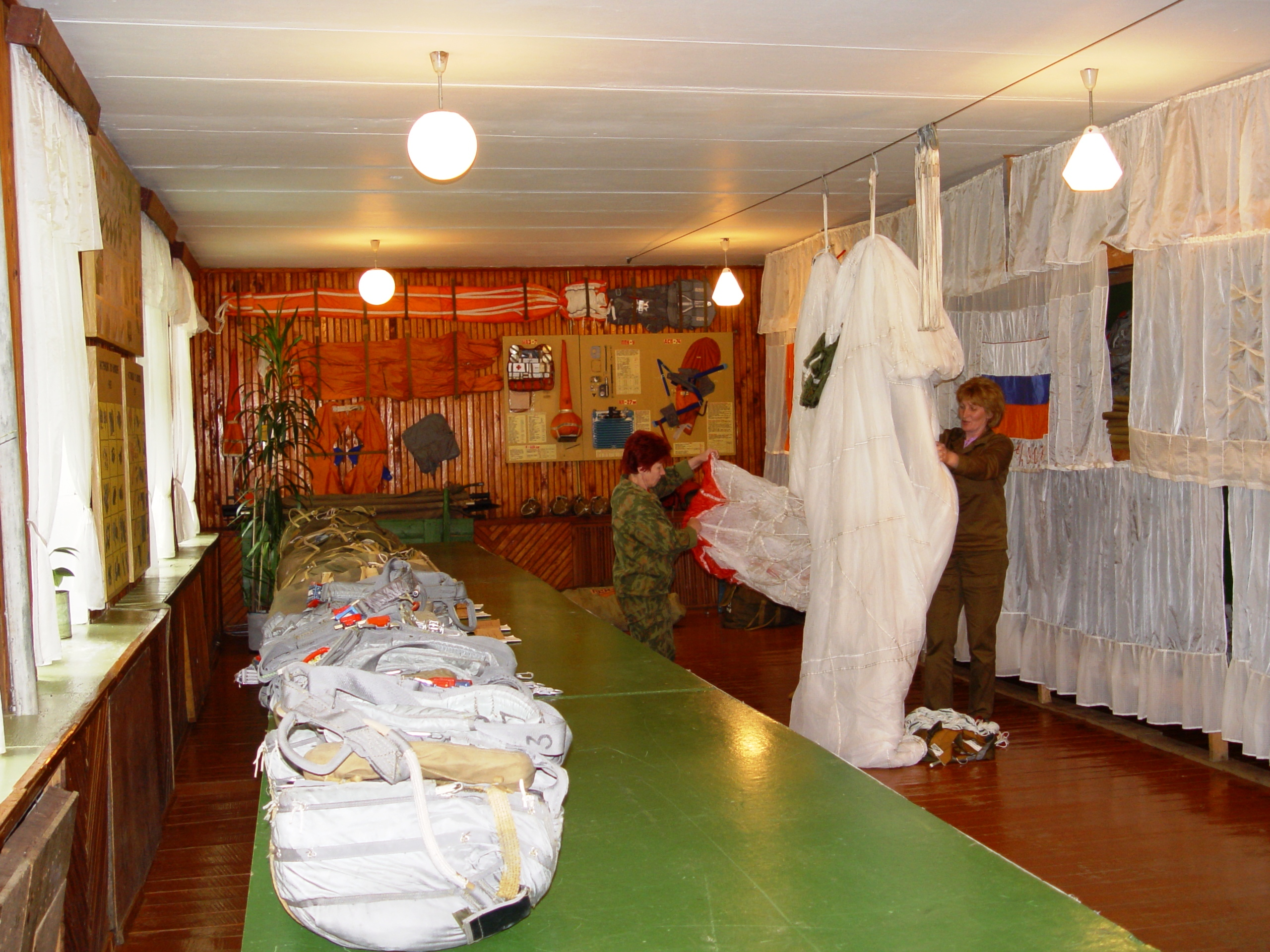 Укладчицы парашютов